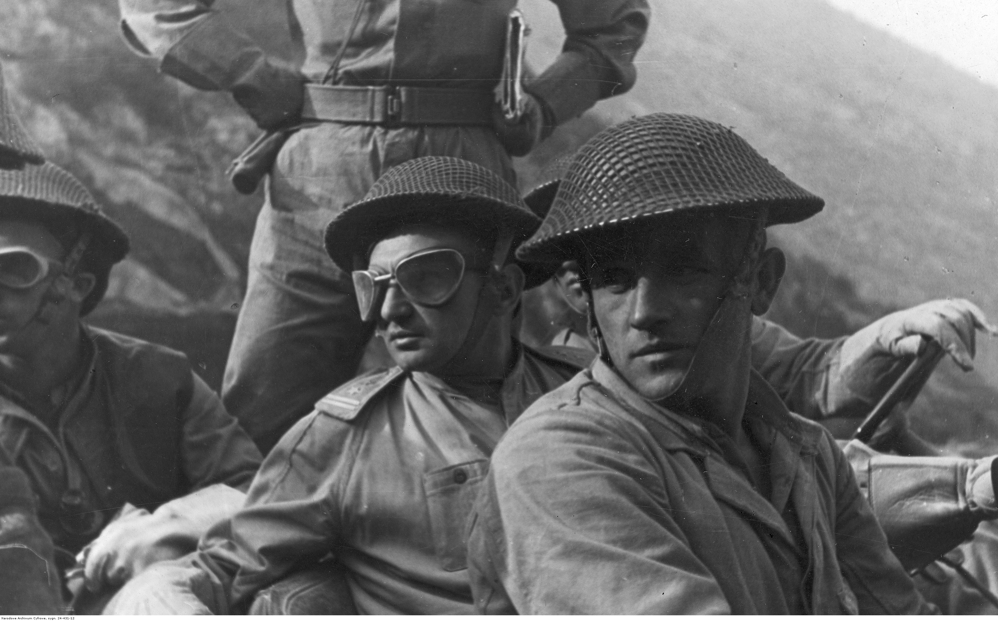 Samodzielna 2 Brygada Pancerna 2 Korpusu Polskiego w bitwie o Monte Cassino. Ppłk Stanisław Gliński (w okularach), dowódca 4 Pułku Pancernego "Skorpion" wizytuje zgrupowanie czołgów w "Gardzieli". Archiwum Fotograficzne Tadeusza Szumańskiego. Sygnatura: 24-431-12